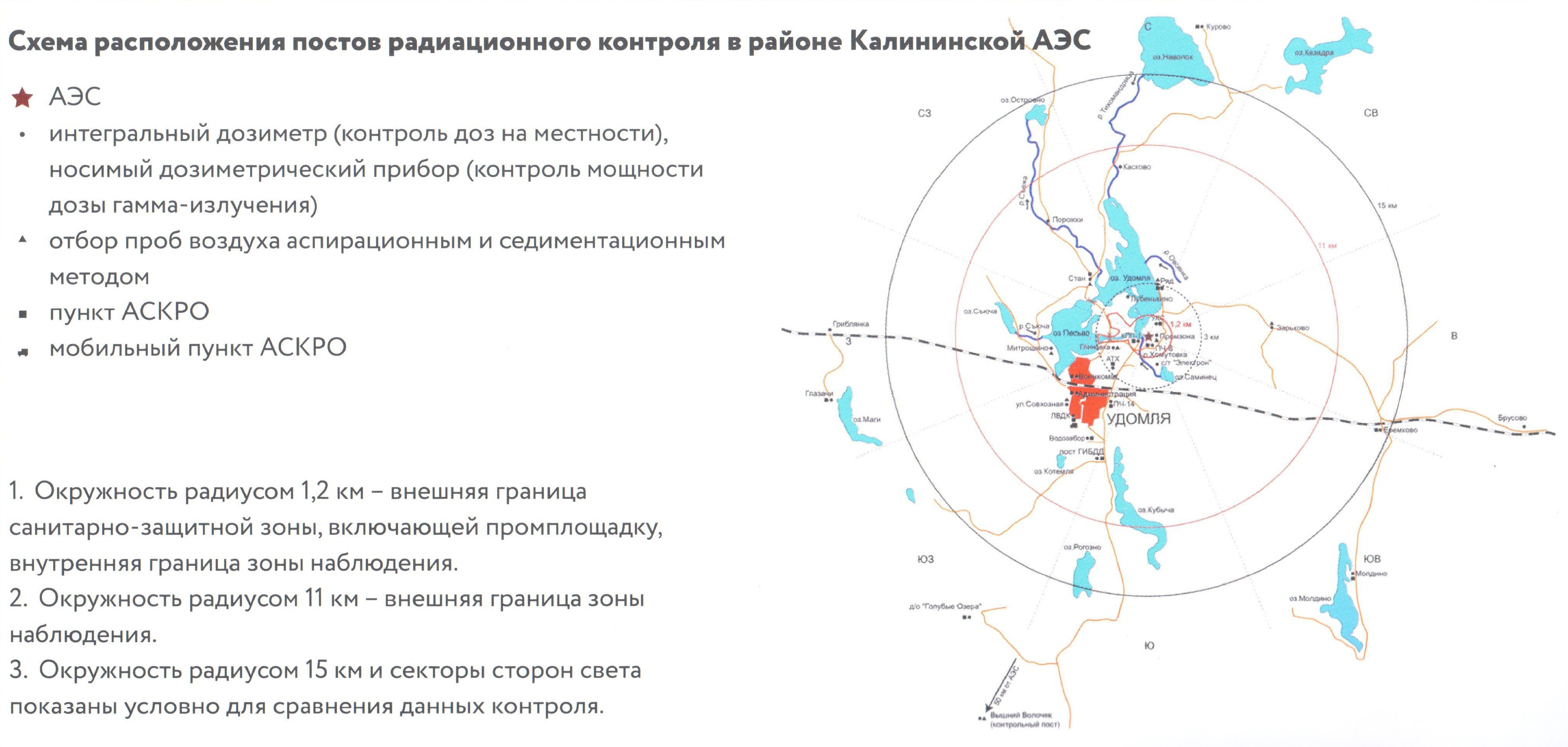 Схема расположения постов радиационного контроля в районе Калин